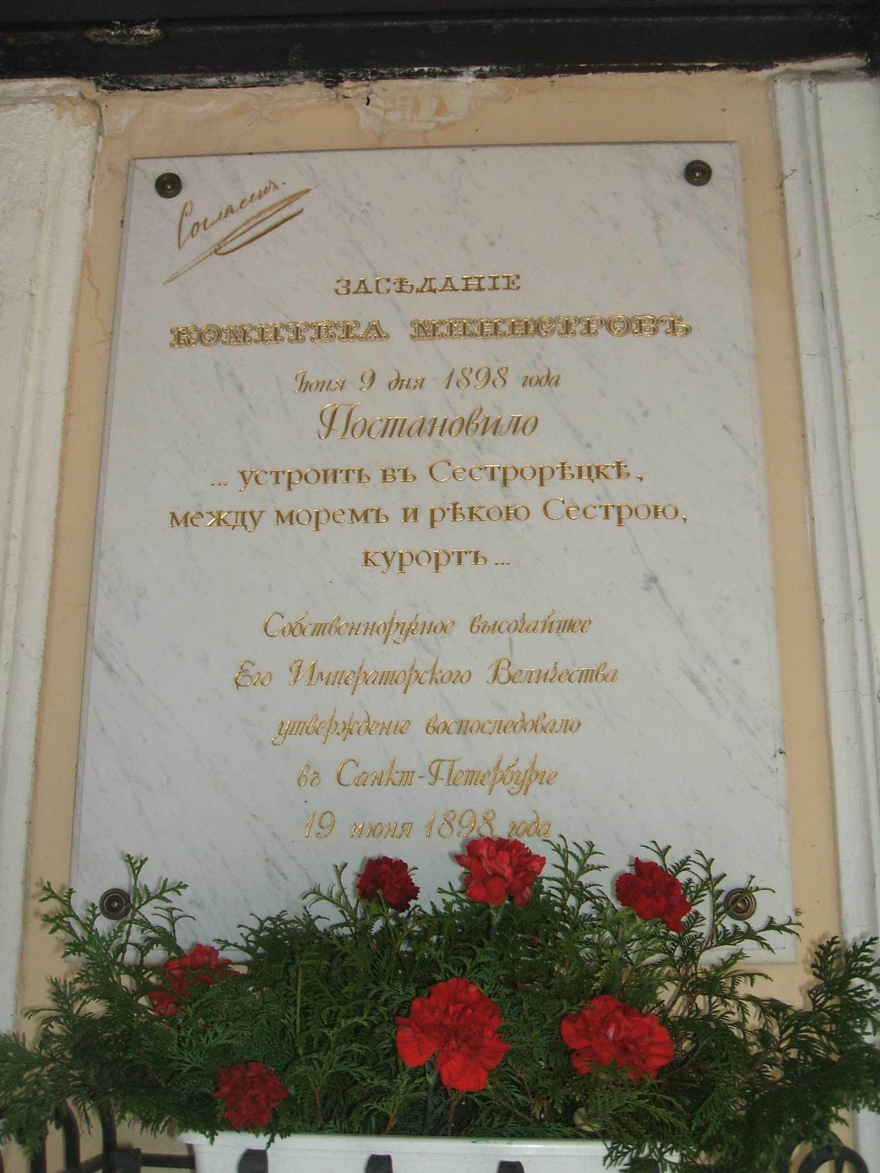 Постановление Правительства о создании Сестрорецкого Курорта